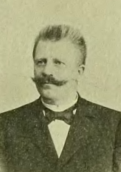 Mariánskohorský obecní tajemník Jan Grmela